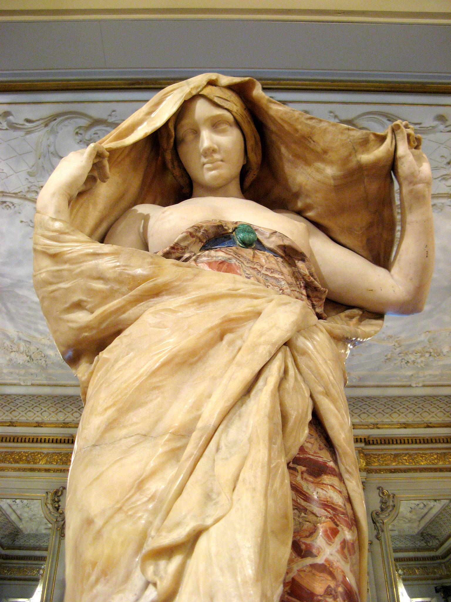 La Nature se dévoilant à la Science (Nature Unveiling Herself Before Science) (1899) by Louis-Ernest Barrias, at Musée d'Orsay